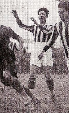 Bologna, stadio Sterlino, 27 marzo 1927. Il difensore juventino Luigi Allemandi (al centro) nel corso della sfida tra Bologna e Juventus (1-0) valevole per la 1ª giornata del girone finale atto all'assegnazione del campionato italiano di Divisione Nazionale 1926-27.